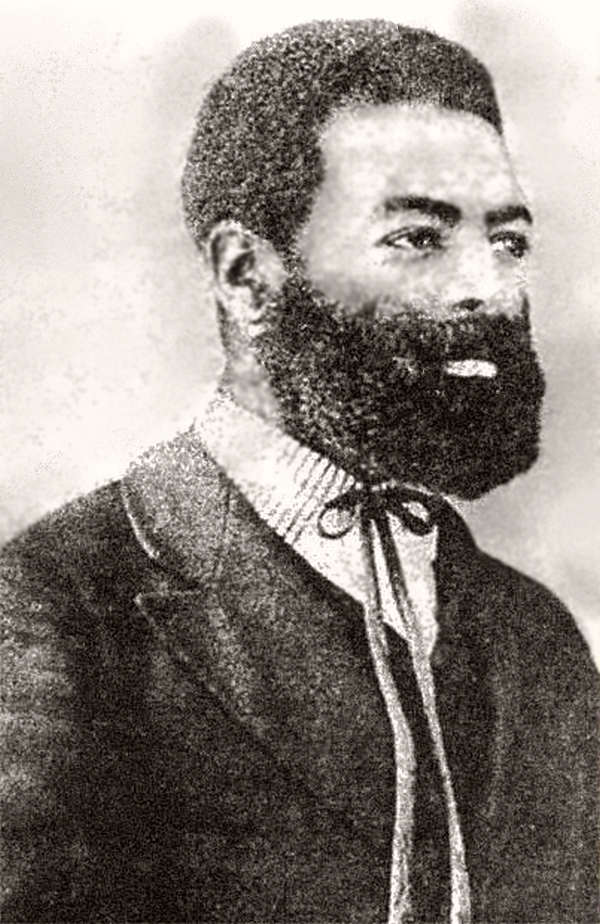 O abolicionista, ex-escravo, brasileiro Luiz Gama (c. 1860)